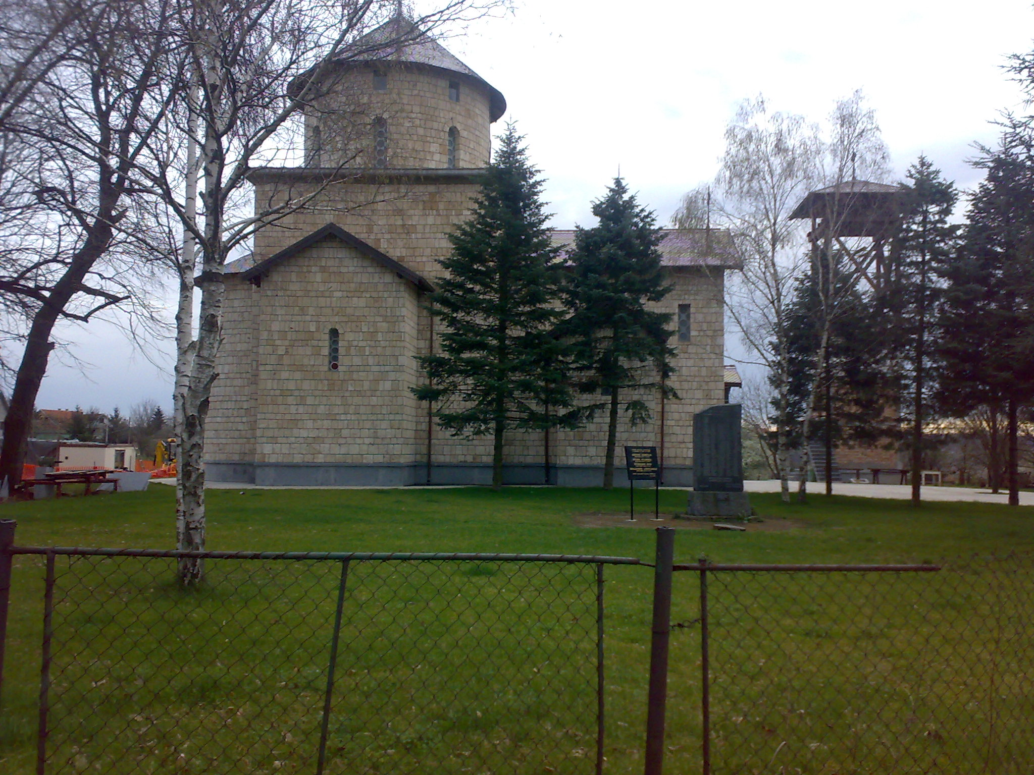 црква у Пиносави